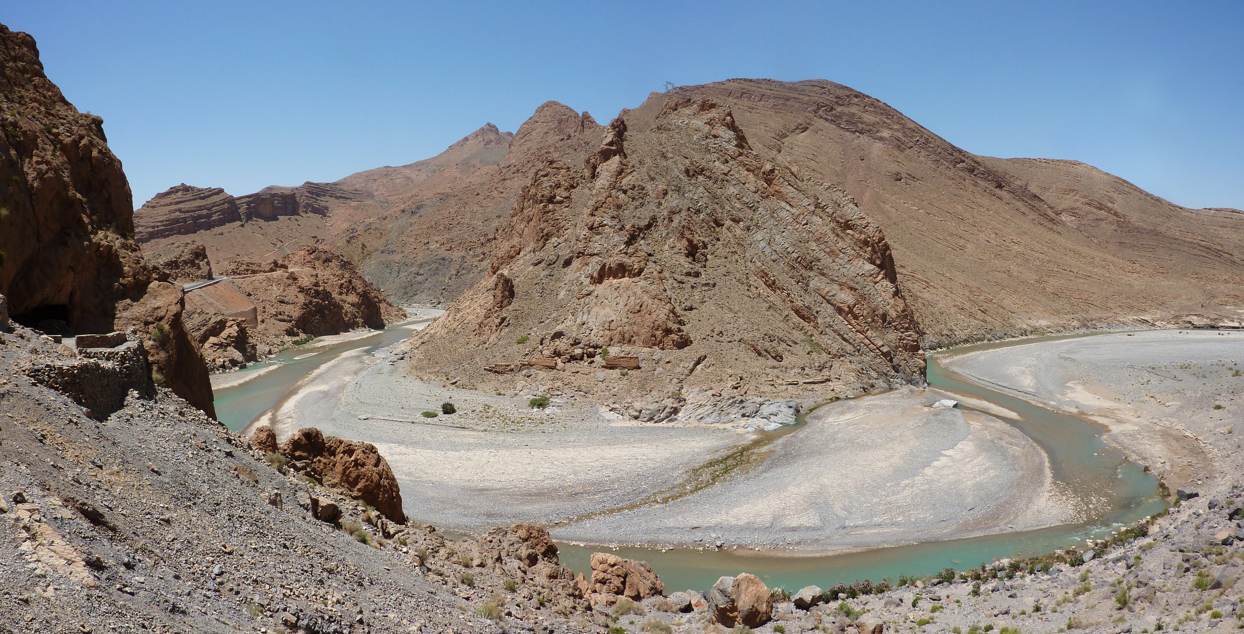 Ziz Gorge Panorama